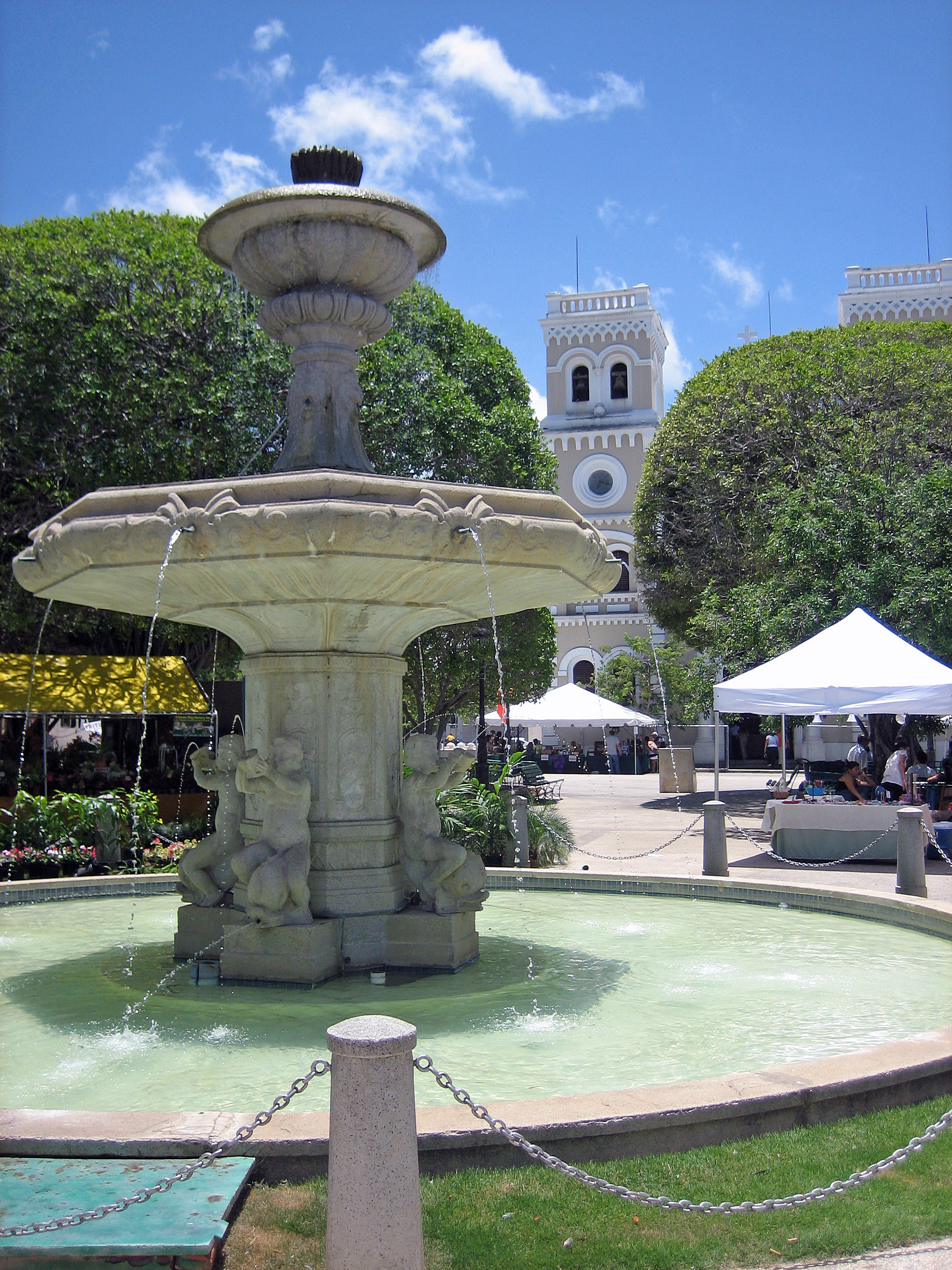 Central plaza in Guayama, Puerto Rico